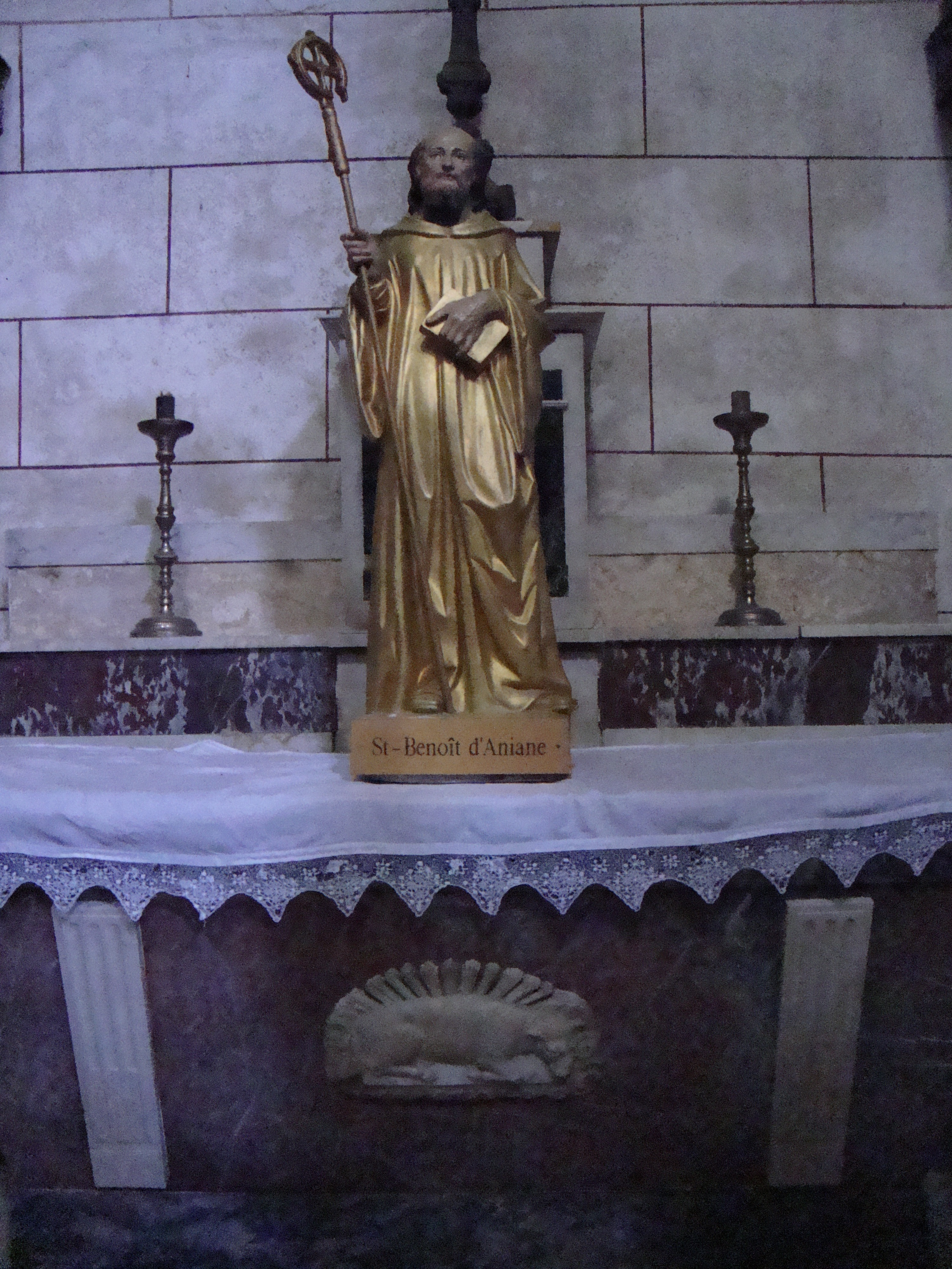 Aniane (Hérault, Fr) église,statue St. Benoît d'Aniane